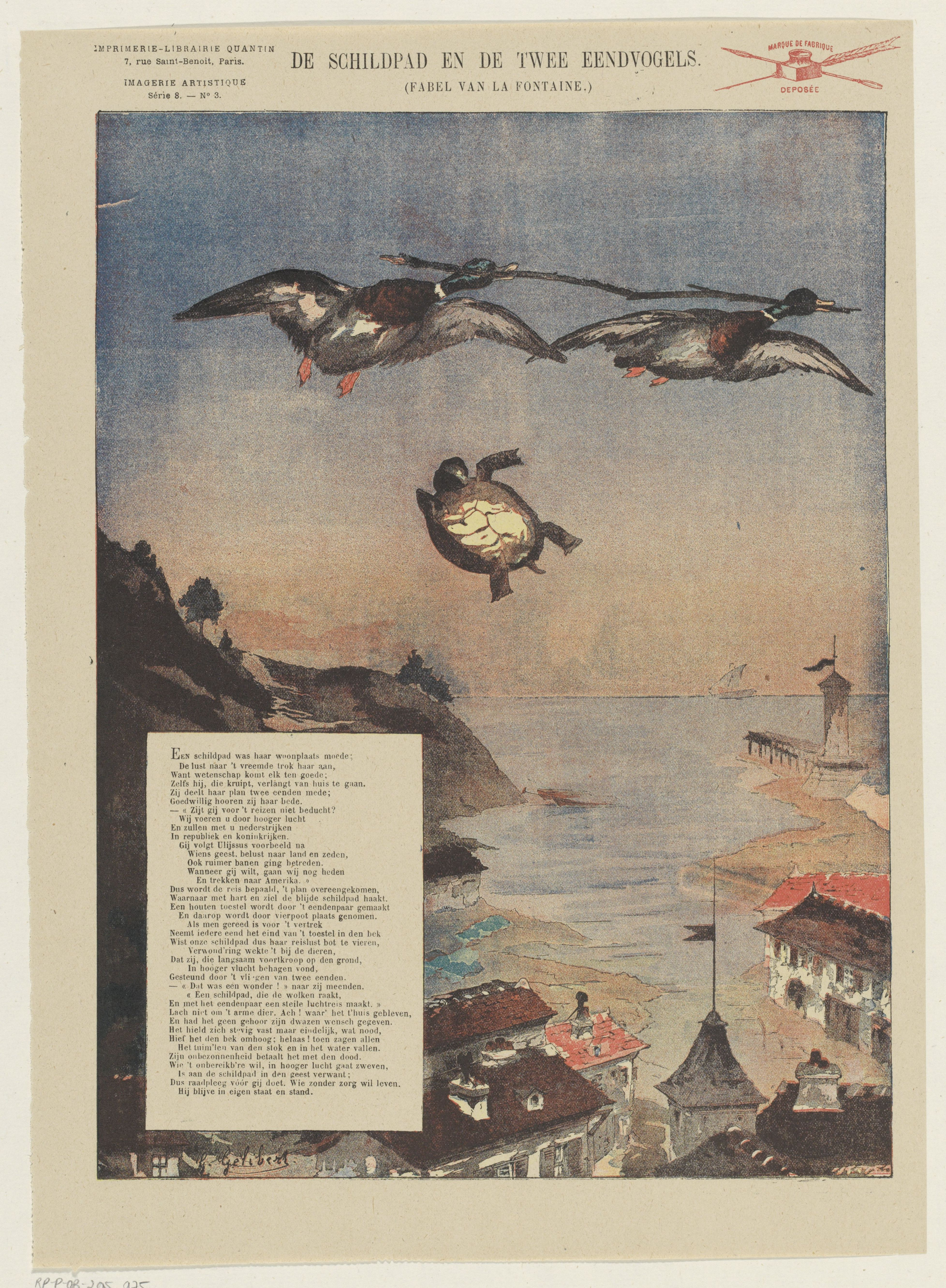 IdentificatieTitel(s): De schildpad en de twee eendvogels (titel op object)Fabel van La Fontaine (serietitel op object)Imagerie Artistique / Série 8 (serietitel op object)Objecttype: prent volksprent Serienummer: 3/20Objectnummer: RP-P-OB-205.975Opschriften / Merken: verzamelaarsmerk, verso, gestempeld: Lugt 2760octrooivermelding, recto rechtsboven, gestempeld: ‘marque de fabrique / deposée’, rode stempel met inktpot, pen en schrijfveerOmschrijving: Blad met een grote voorstelling uit de fabel van Jean de La Fontaine, over de schildpad en de twee eenden. Linksonder een tekstblok met versregels. Genummerd linksboven: Série 8. - No. 3.VervaardigingVervaardiger: prentmaker: Gaston Gélibert (vermeld op object)ontwerper: Gaston Gélibert (vermeld op object)uitgever: Albert Quantin (vermeld op object)Plaats vervaardiging: ParijsDatering: 1876 - 1890 en/of 1890Fysieke kenmerken: kleurenlithografie en tekst in boekdrukMateriaal: papier Techniek: kleurenlithografie (procedé) / boekdrukAfmetingen: blad: h 367 mm × b 266 mmOnderwerpWat: fabelstortoises, turtleswater-birds: duckflyingVerwerving en rechtenCredit line: Schenking van de heer F.G. Waller, AmsterdamVerwerving: schenking 1923Copyright: Publiek domein